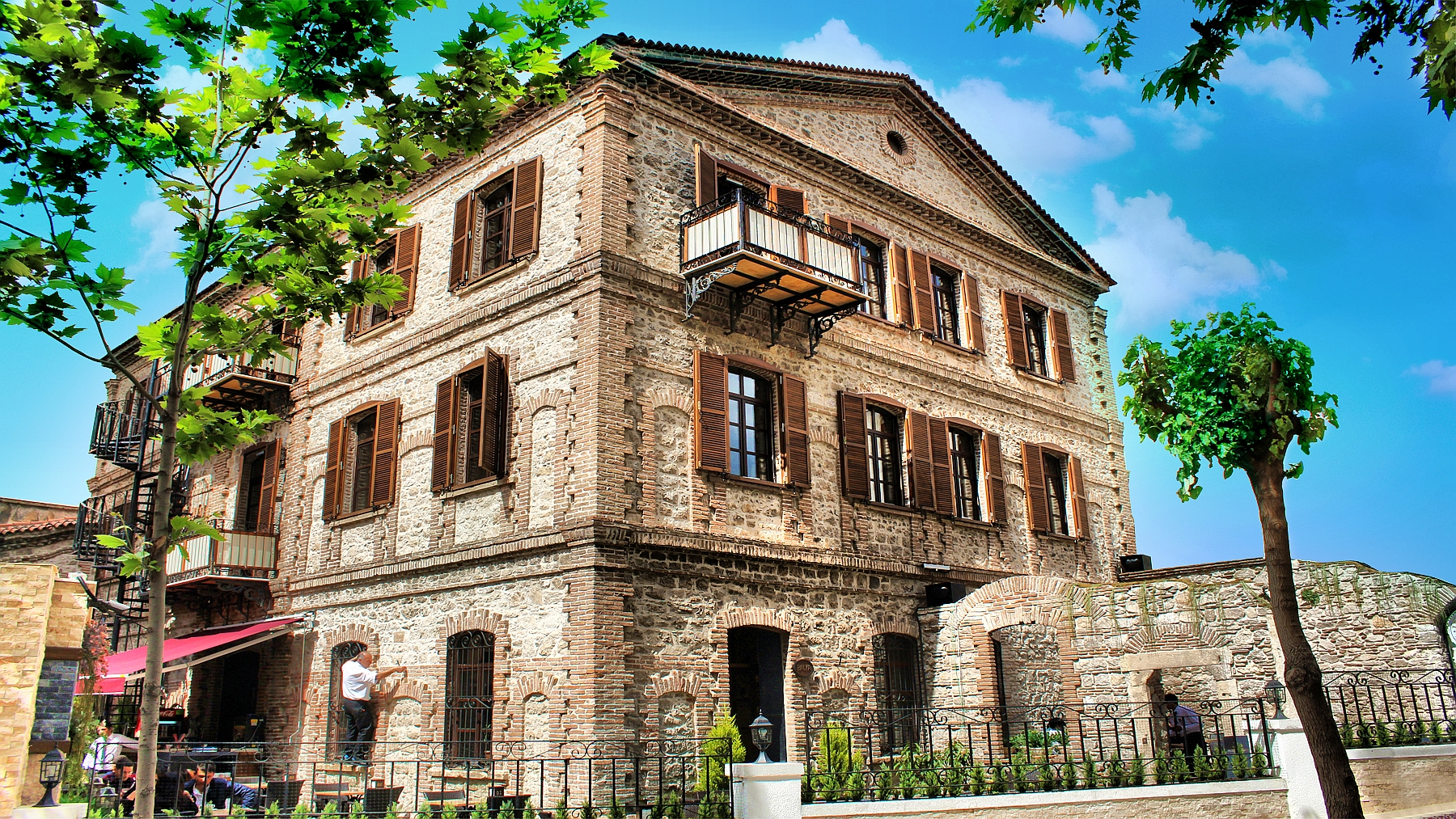 taş fabrika manisa türkiye